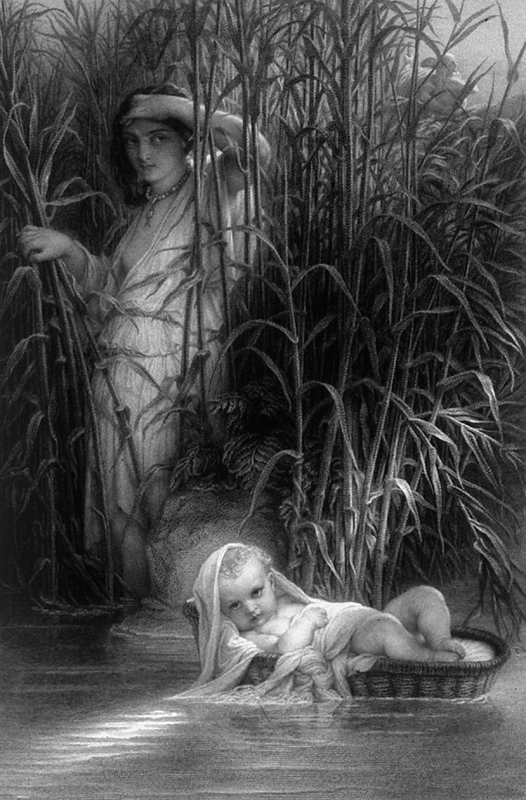 Moïse exposé sur le Nil, gravure au burin de Louis-Pierre Henriquel-Dupont, 1858, d'après un tableau de Paul Delaroche